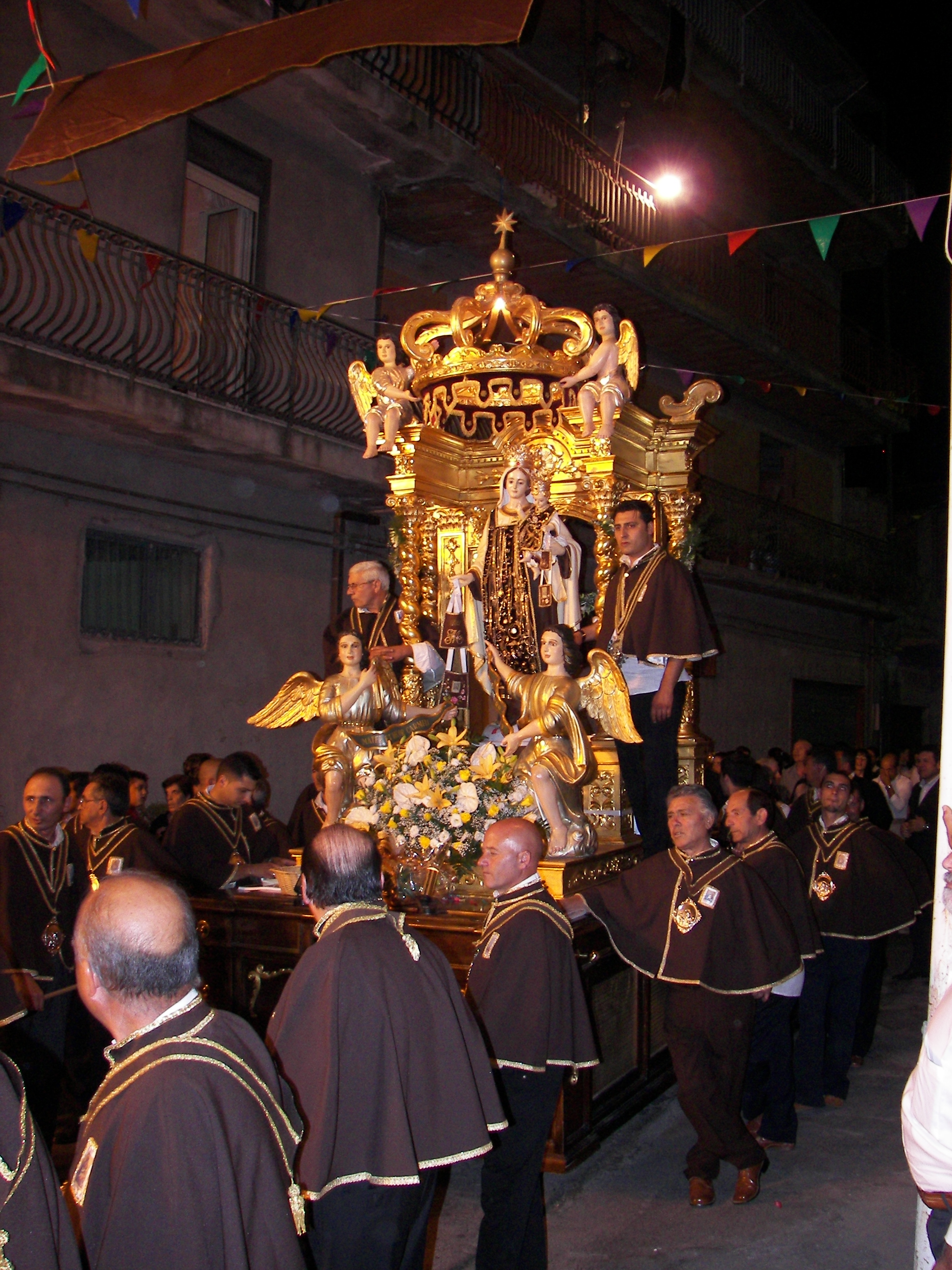 Santa Maria di Licodia, processione della Madonna del Carmelo il 16 Luglio.